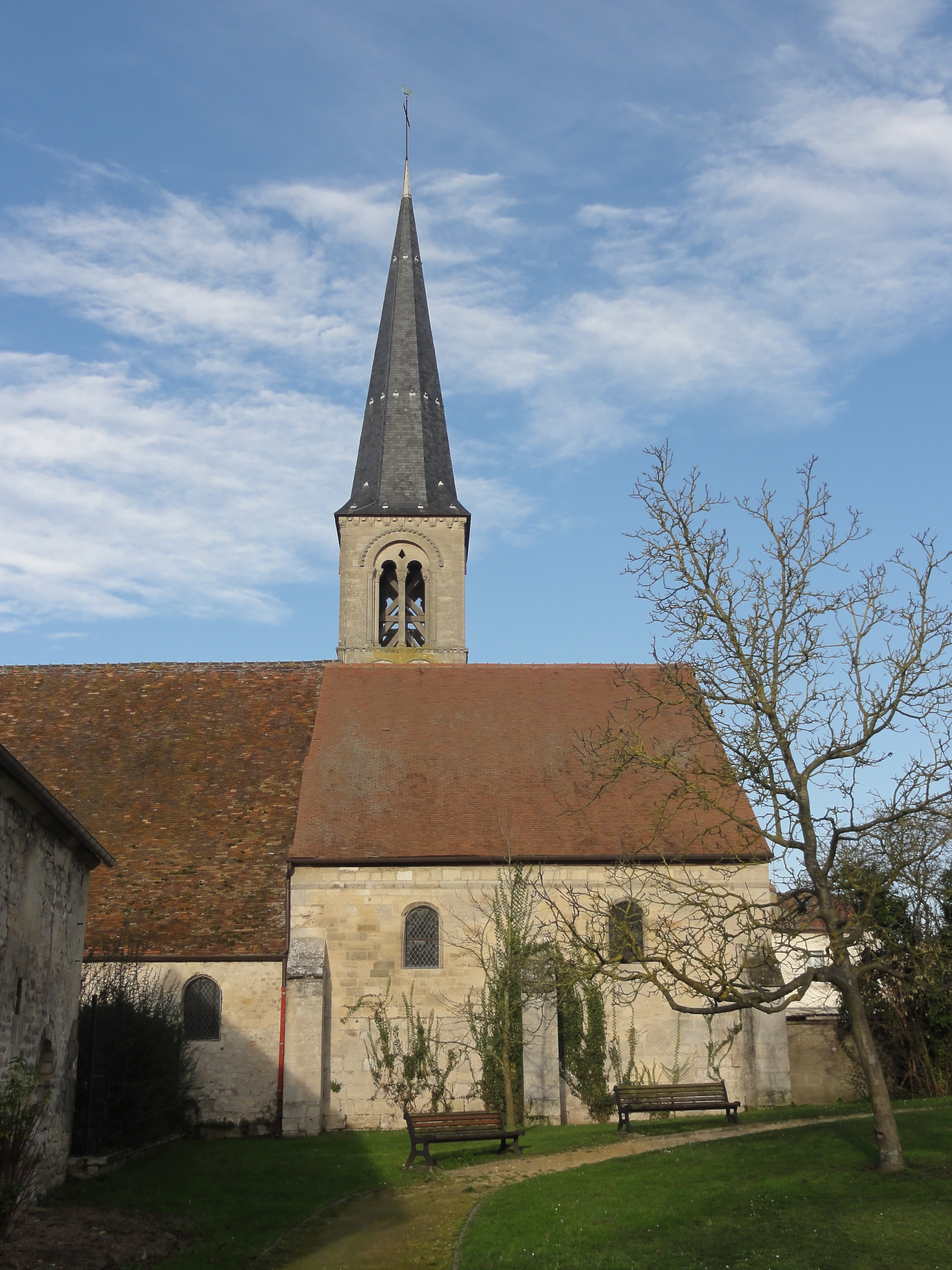 Chapelle sud et clocher, vue depuis le sud.